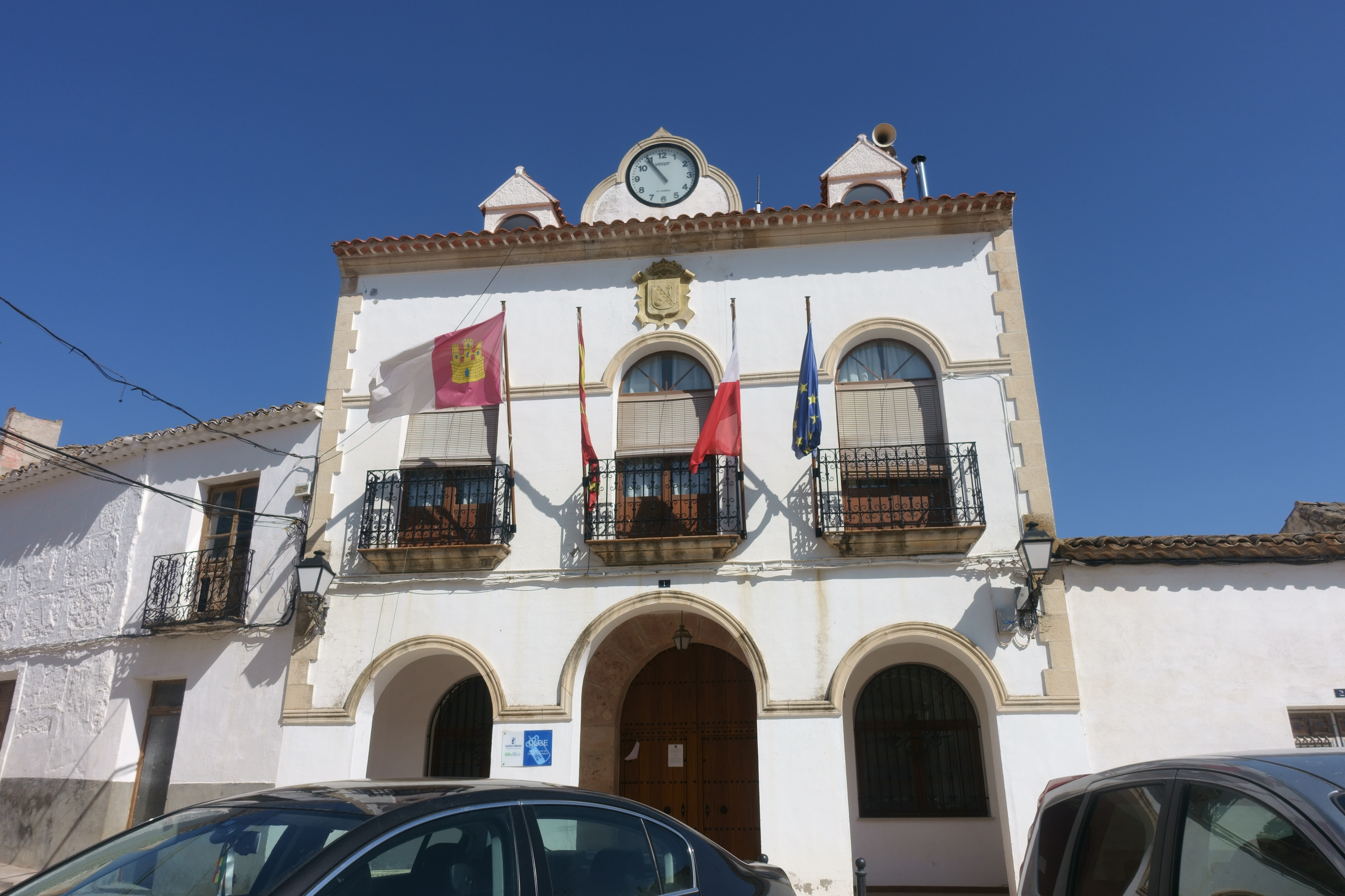 Casa consistorial de Los Hinojosos (Cuenca, España).